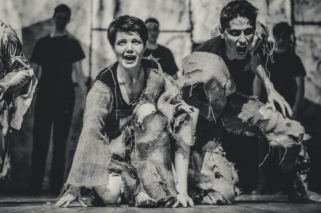 Notre Dame de Paris - Театр мюзикла Комильфо